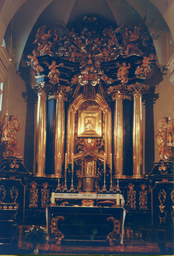 Barokowy ołtarz 1741 autorstwa Antoniego Frąckiewicza z renesansowym obrazem Matki Bożej w kościele Nawiedzenia Najświętszej Marii Panny w Tuchowie